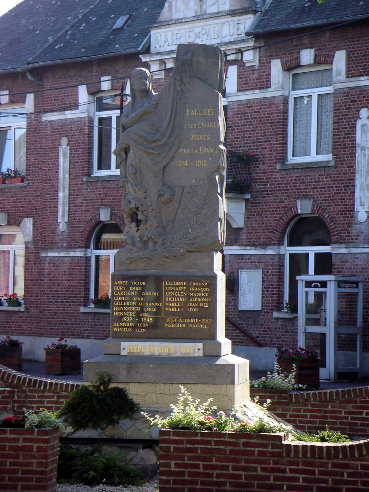 Monument aux morts de Palluel (Pas-de-Calais) tombés pour la France.